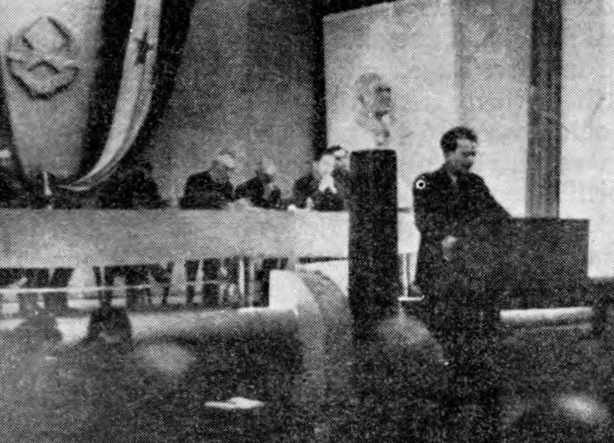 Josip Vidmar govori na II. zasedanju AVNOJ v Jajcu.